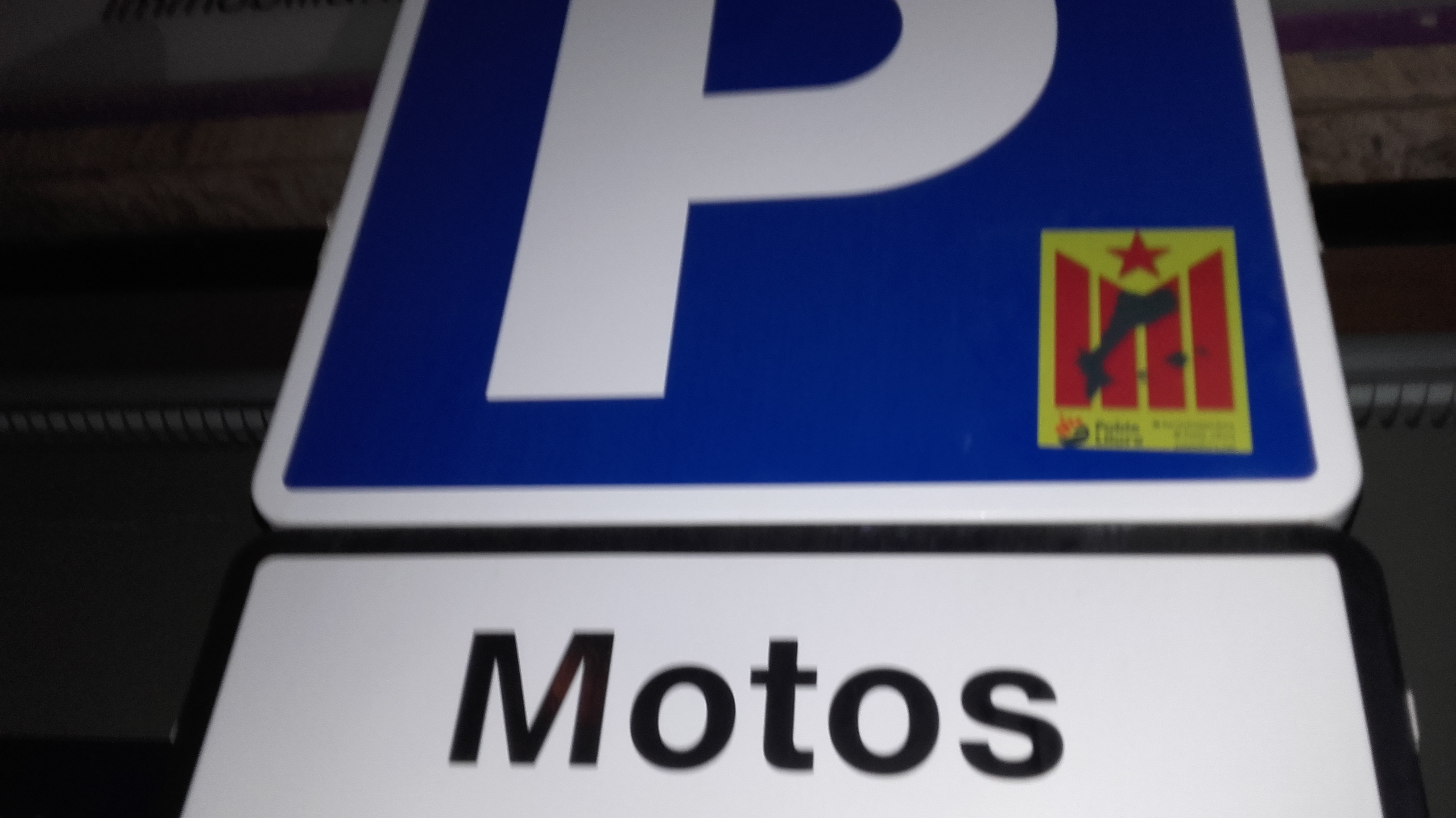 La reivindicació de la Nació completa ha estat una constant en totes les organitzacions de l'independentisme combatiu.